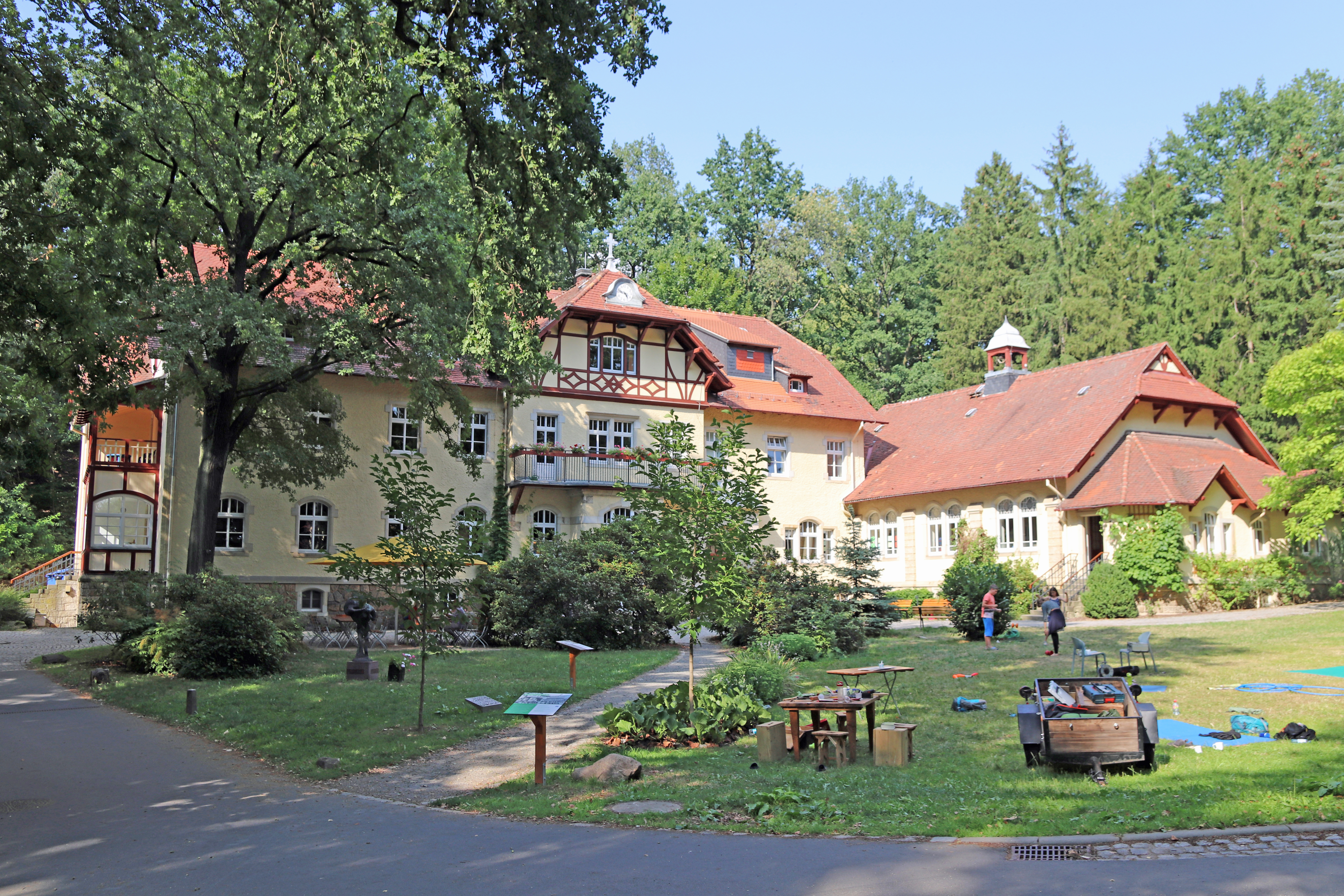 Das sog. Brunnenhaus mit Verwaltung, Küche und Kirchsaal